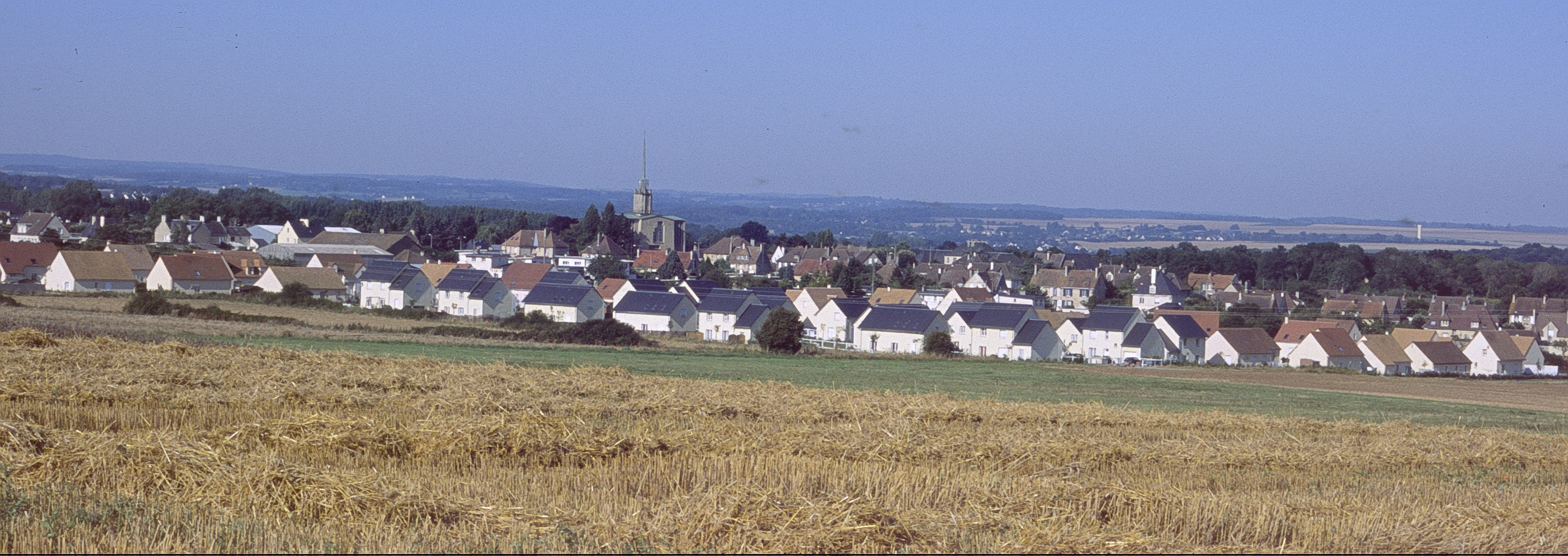 Vue globale de May sur Orne; Calvados; France